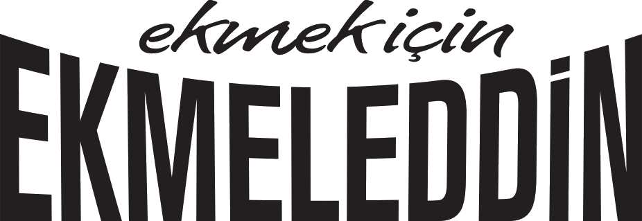 Ekmeleddin İhsanoğlu'nun 2014 Türkiye cumhurbaşkanlığı seçimi için kullandığı kampanya sloganı. Kampanya süresince bu sloganın üst kısmında "birliği", "dirliği" ve "sevgiyi" olmak üzere sloganı güçlendirici çeşitli kelimeler kullanılmıştır. Ayrıca kimi zaman bu sloganın yanında buğday tarlası şeklindeki Türkiye haritasından oluşmuş bir logo da kullanılmıştır.